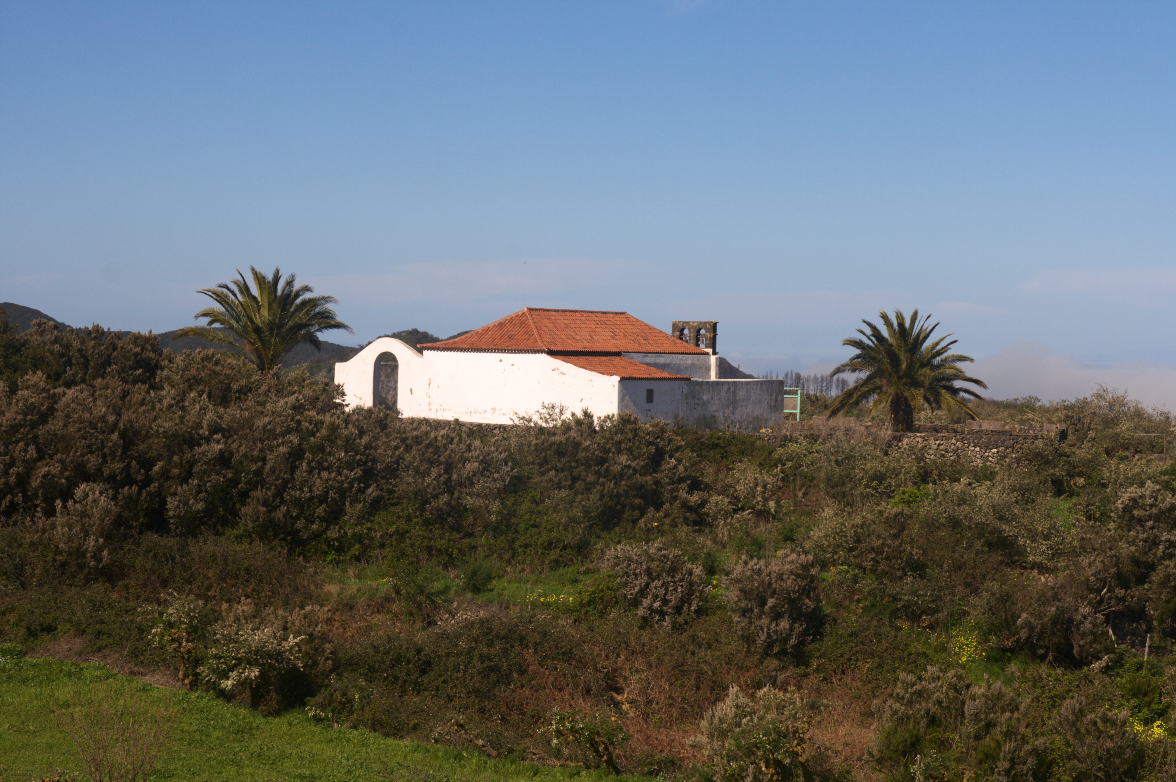 Ermita de San José, El Tanque, Tenerife